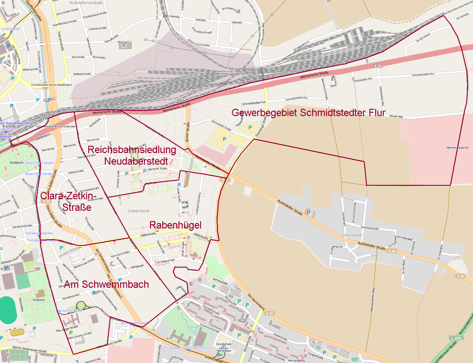 Eine Karte der Viertel im Stadtteil Daberstedt von Erfurt.